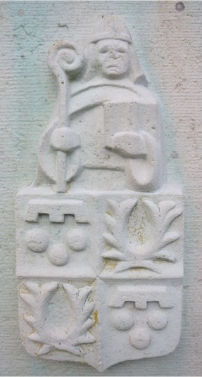 Oorlogsmonument Schaesberg. (Witranden van originele afbeelding zijn verwijderd.)